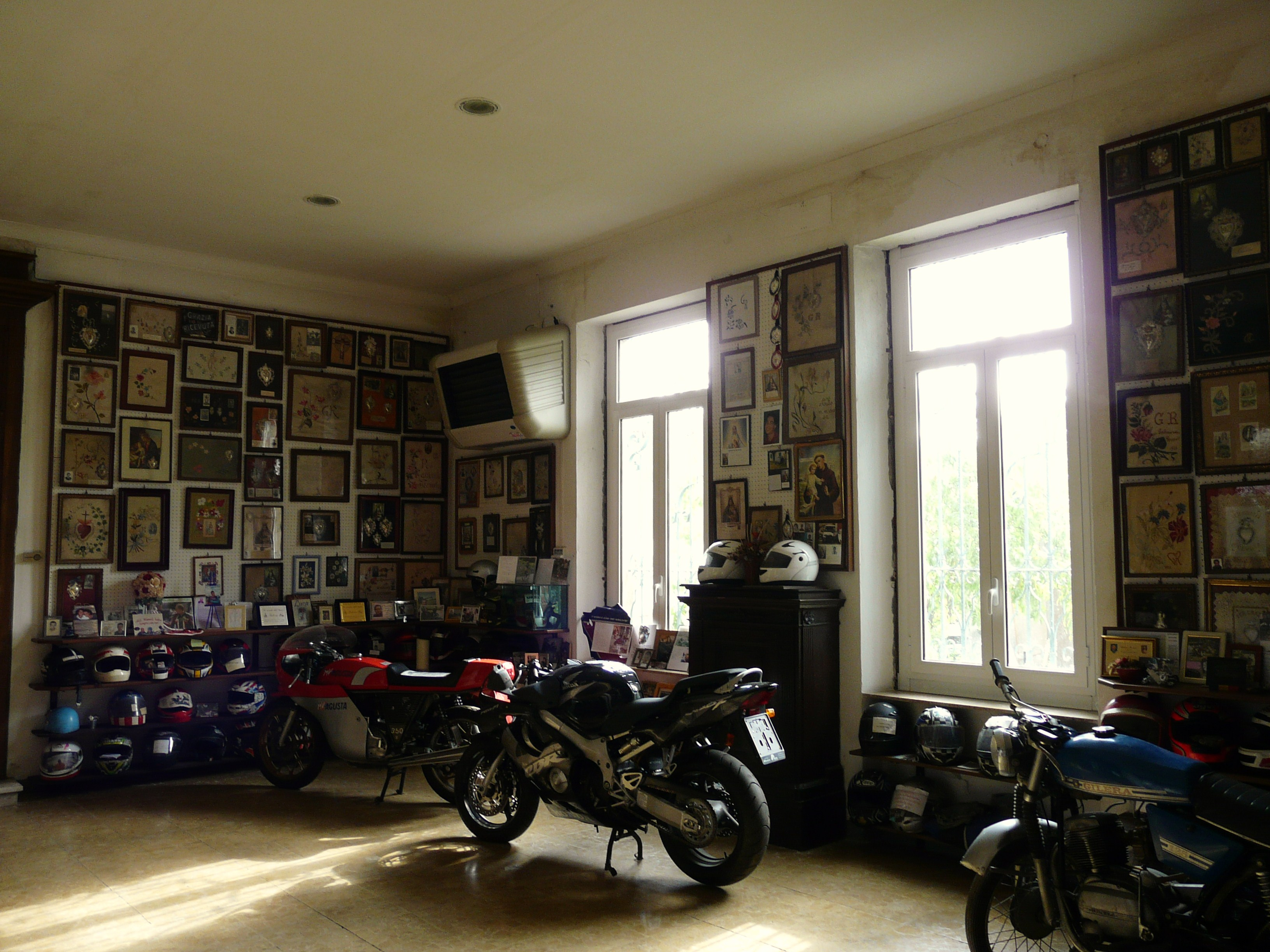 Sagrestia del santuario della Creta, Castellazzo Bormida, Piemonte, Italia